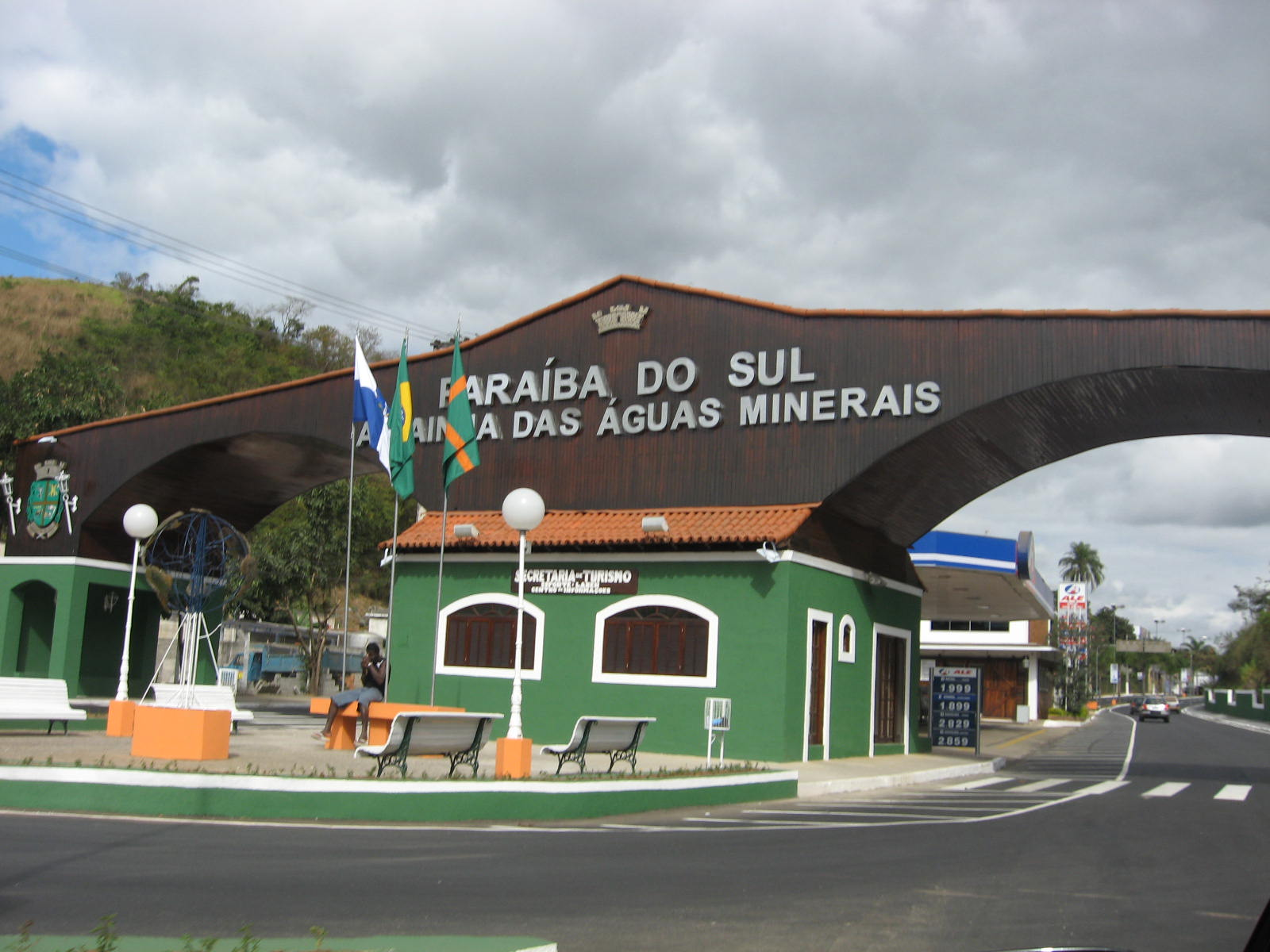 Entrada de Paraíba do Sul, no estado do Rio de Janeiro.